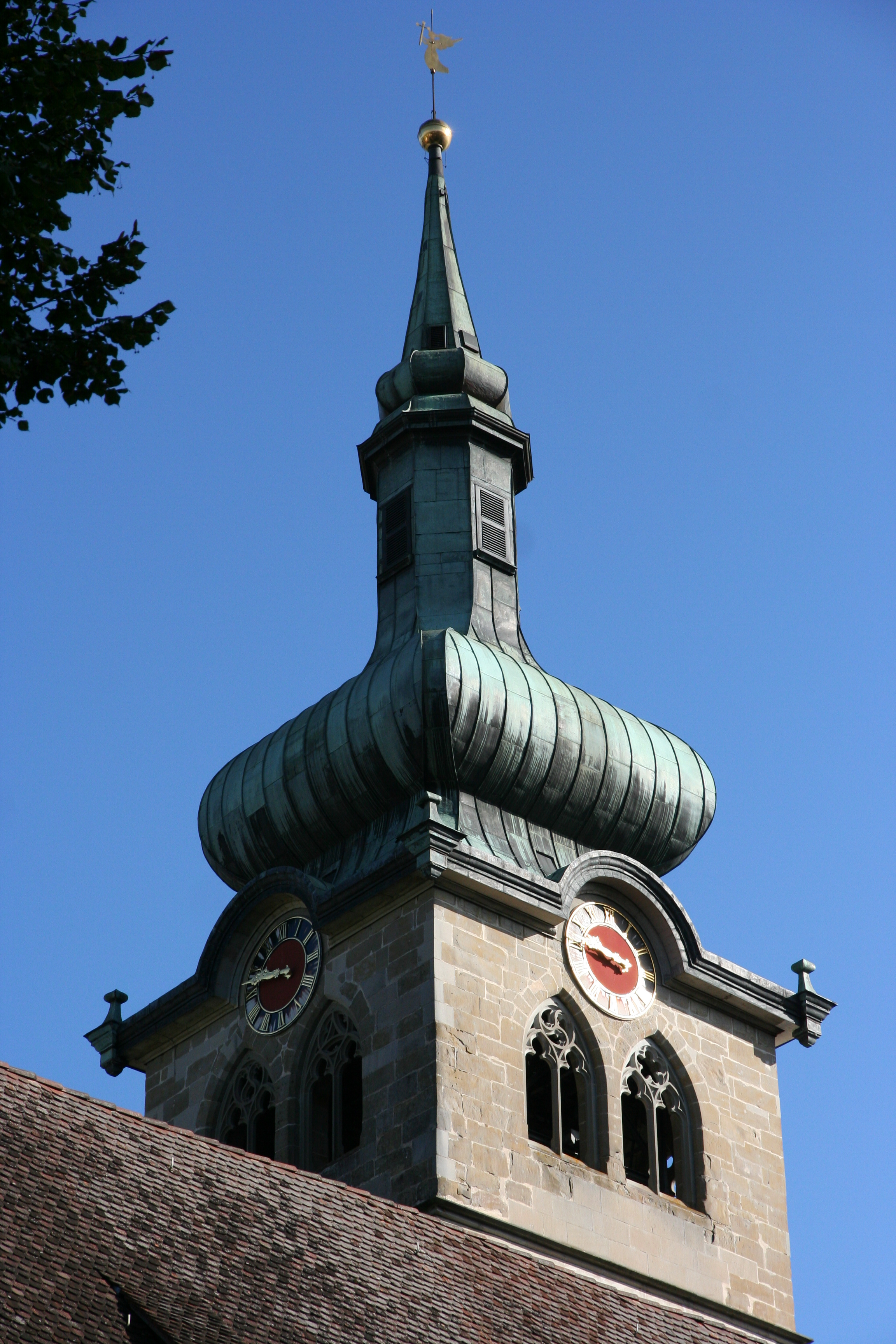 röm.-kath. Pfarrkirche St. Pelagius in Bischofszell